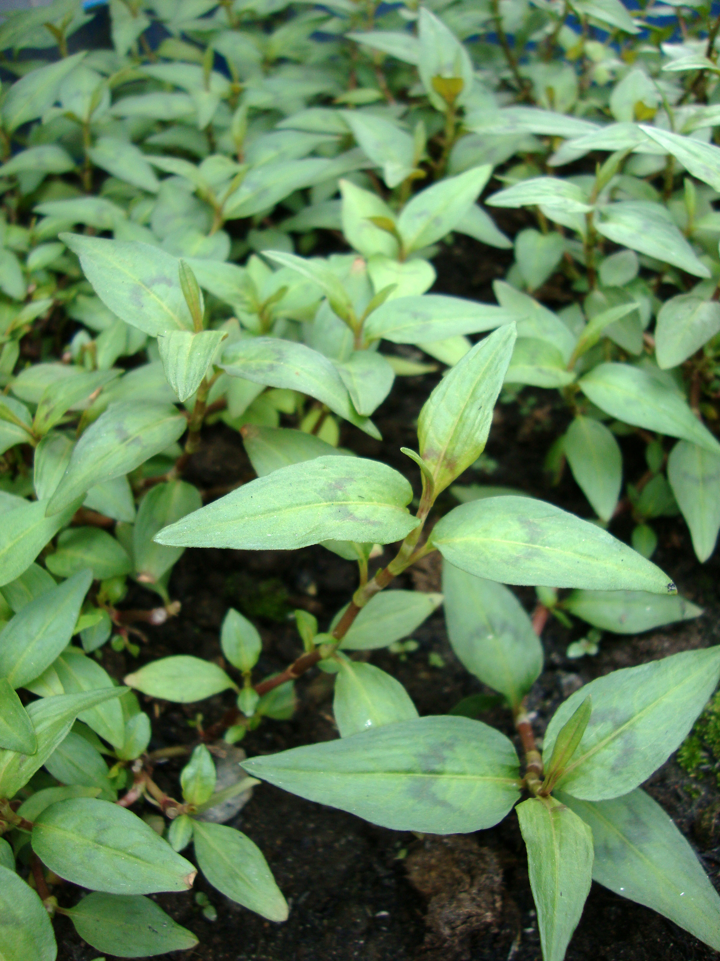 Persicaria odorata (Lour.) Soják, 1974